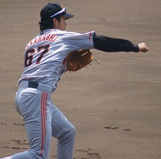 giants_takahashi_67